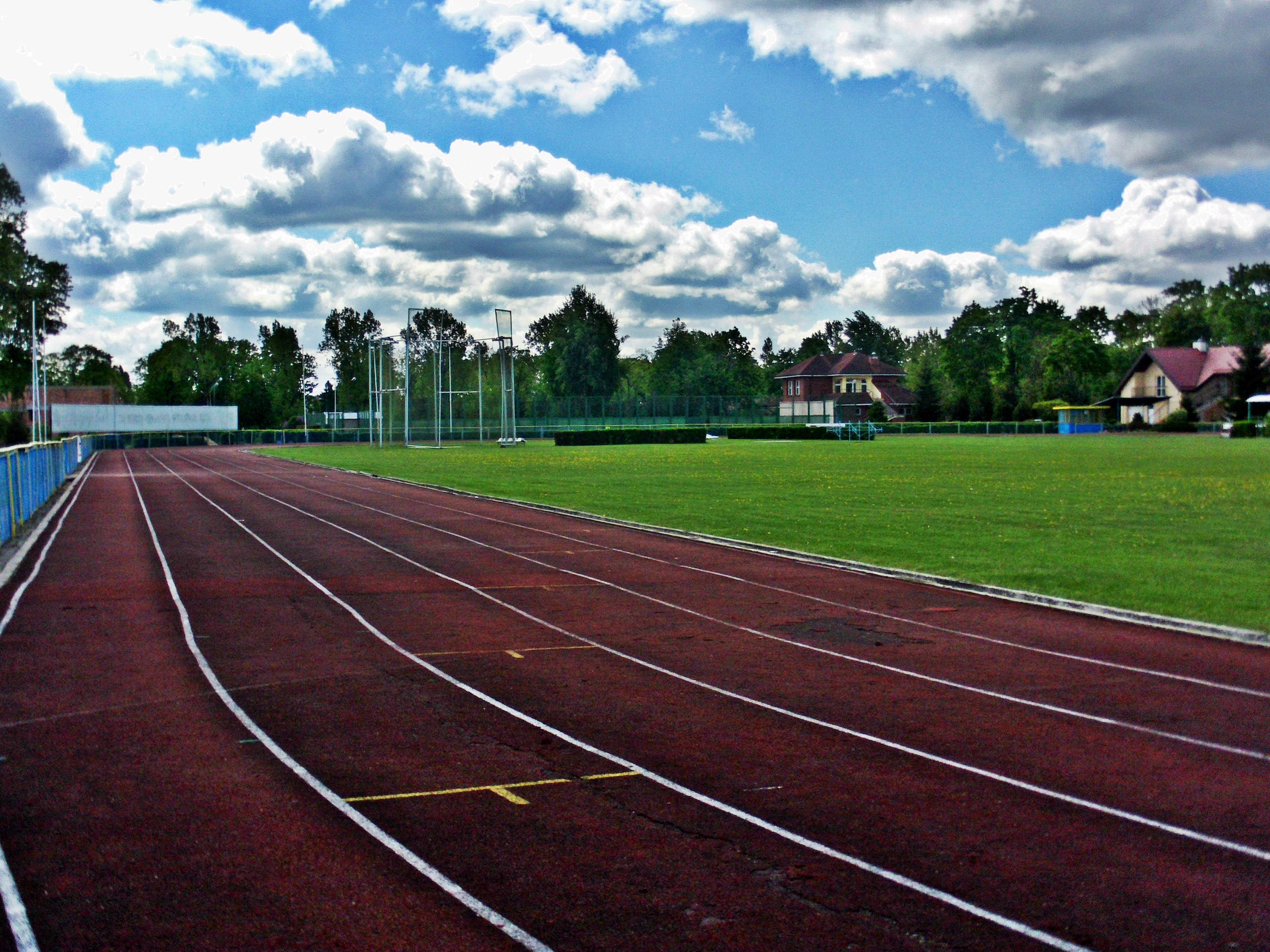 Stadion lekkoatletyczny w Suwałkach. Zdjęcia z 2012 roku. Stan obiektu przed planowaną modernizacją.